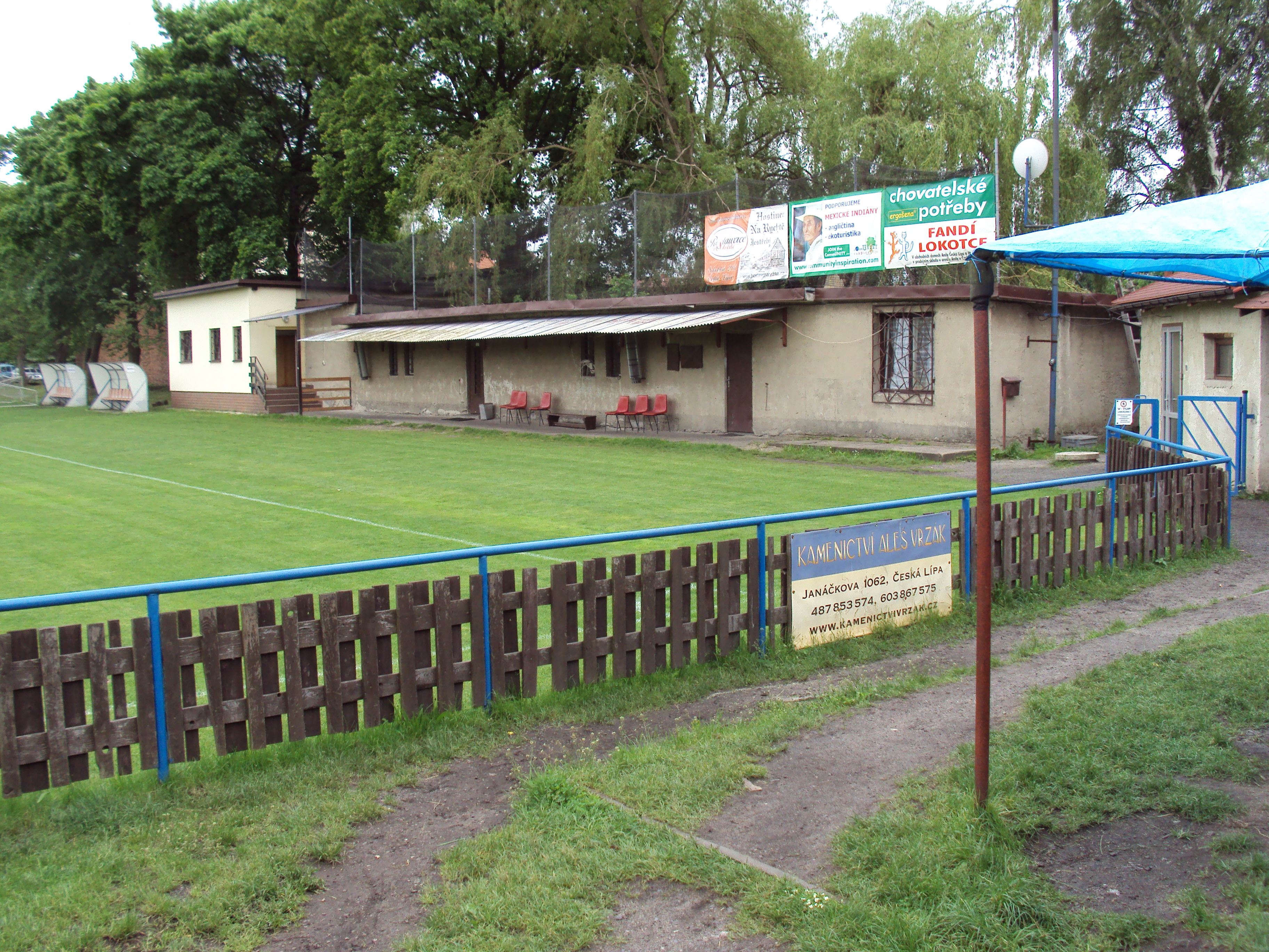 Hřiště TJ Lokomotiva Česká Lípa je 200 metrů od vlakového nádraží